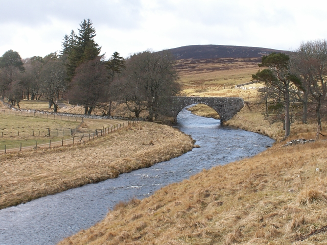 Berriedale Water, Braemore